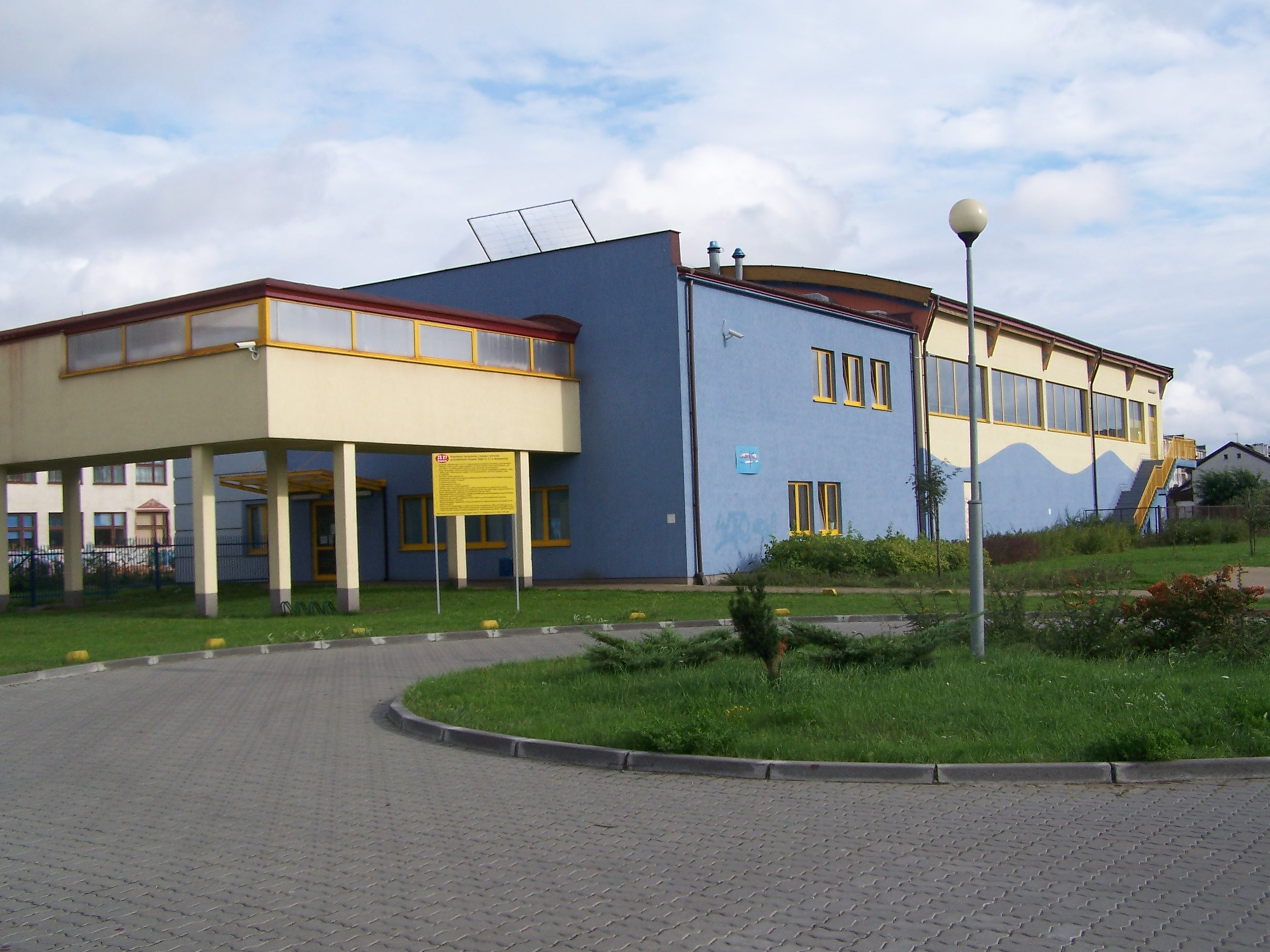 Basen Sardynka (Pool Sardynka) Bydgoszcz - Osowa Góra